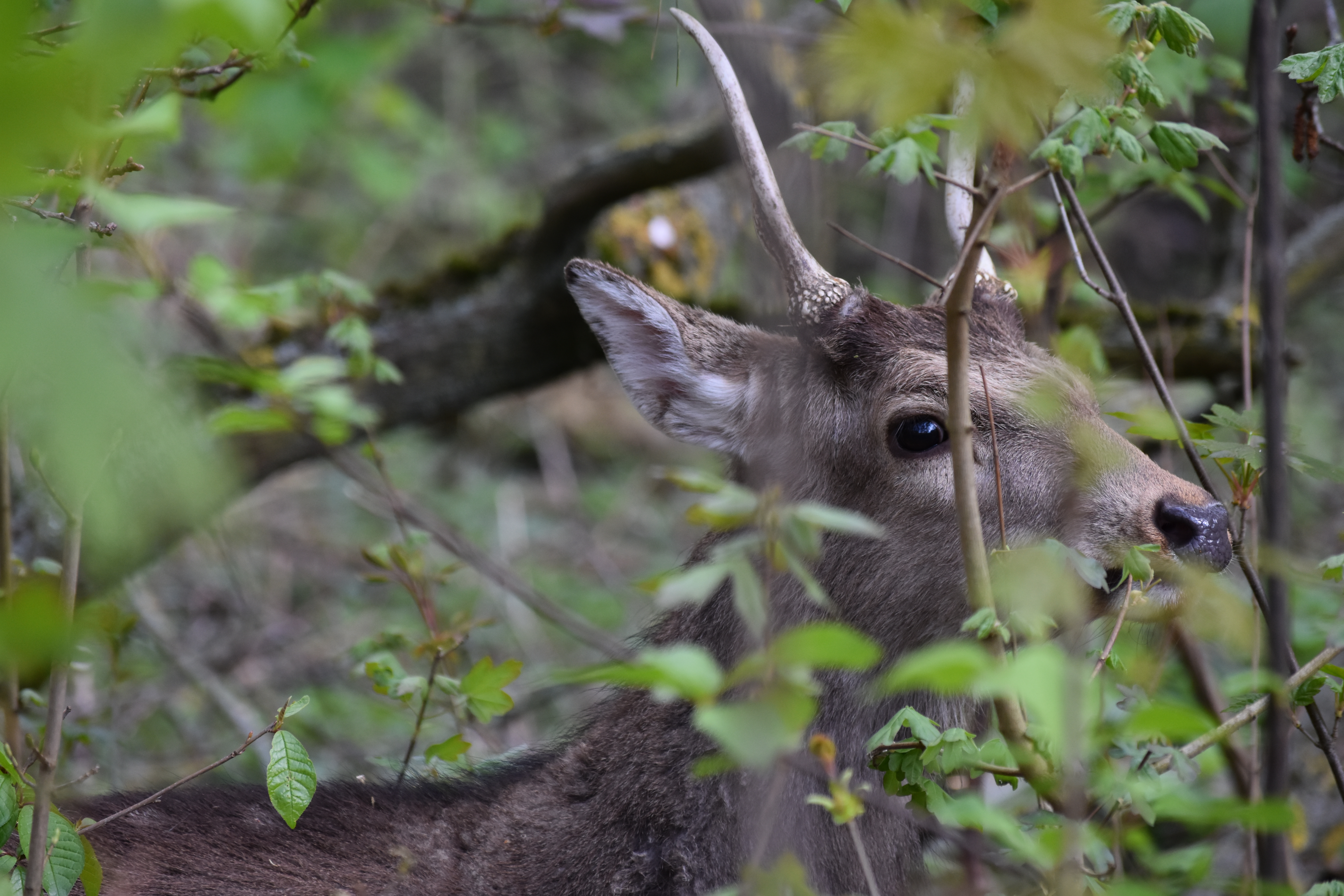 Rehbock, Ludwigshafen am Rhein, Maudacher Bruch